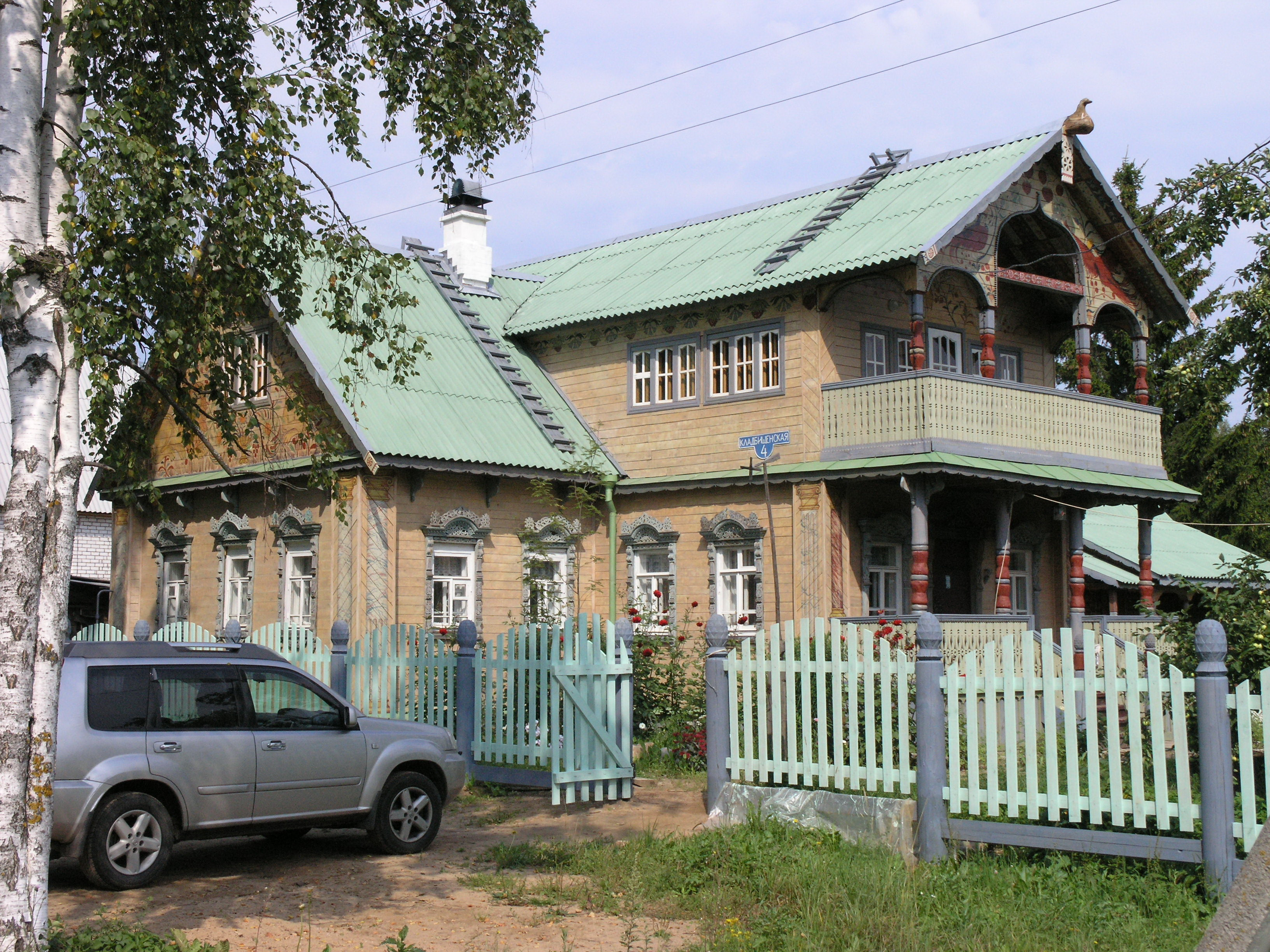 Город Мышкин. Творческая дача фонда "Шуховская башня"(shukhov.ru)